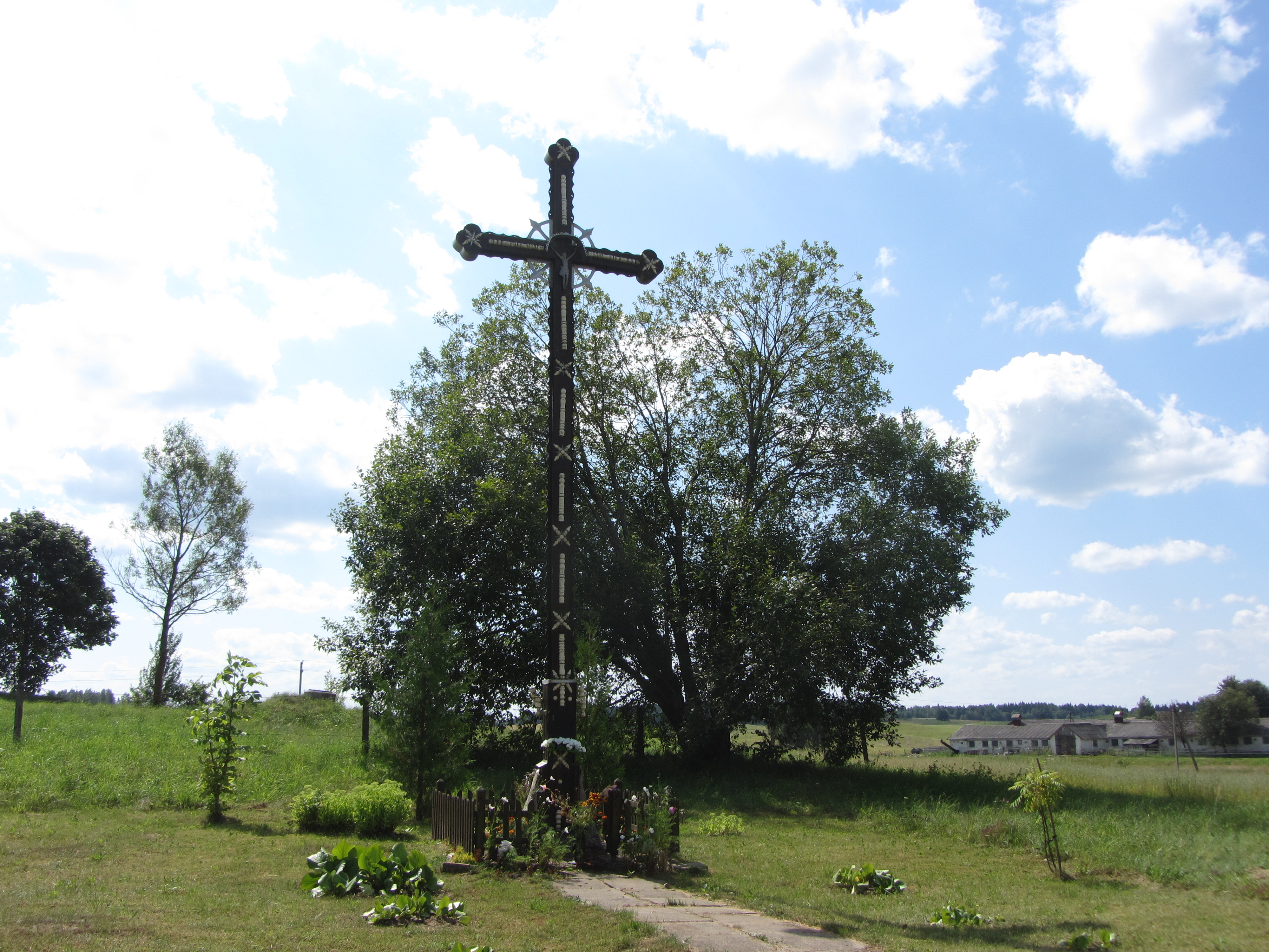 Kukiškė 18108, Lithuania